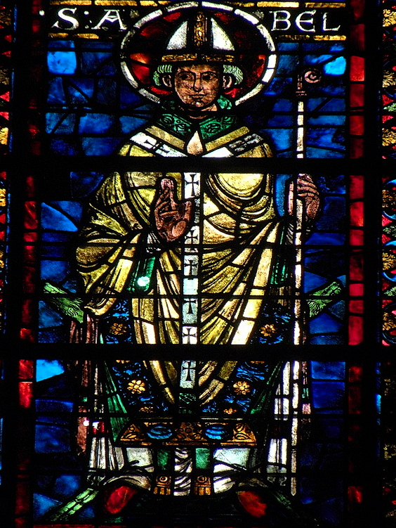 Saint-Abel. Détail de la baie 204 de la basilique Saint-Rémi de Reims (51). Localisation: fenêtre-haute méridionale du chœur de la basilique Saint-Rémi de Reims (51). Datation: 4ème quart du XIIème siècle. Description: l'archevêque Saint-Abel. Classement: 1er janvier 1841.